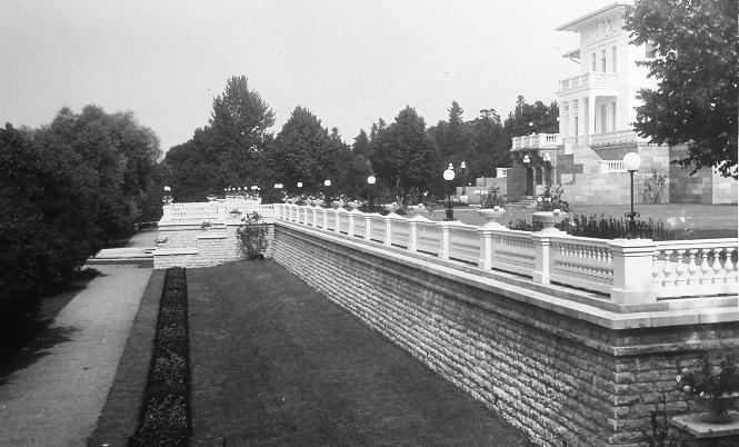 Oru loss 1930.-tel.